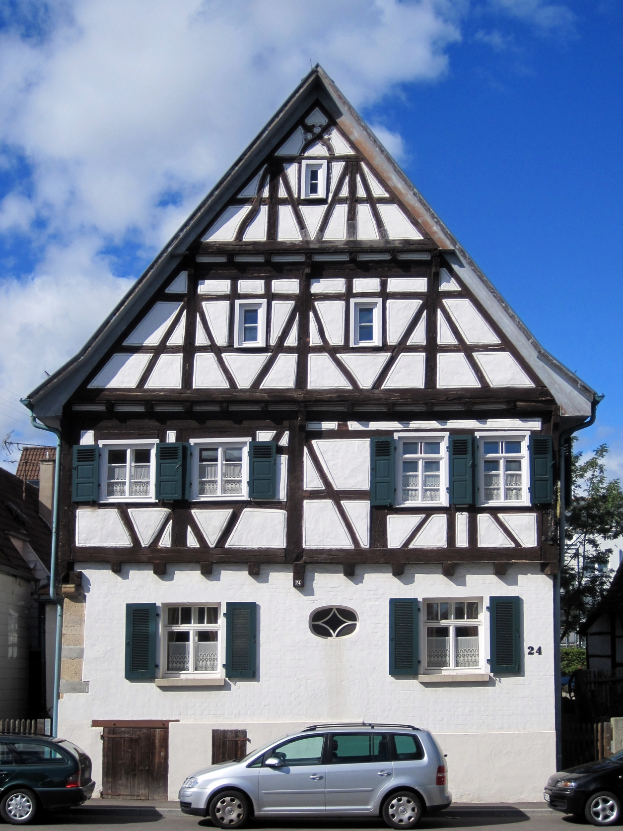 Leinfelder Haus in Leinfelden-Echterdingen, Stadtteil Leinfelden. Details zum Kulturdenkmal gibt es hier.